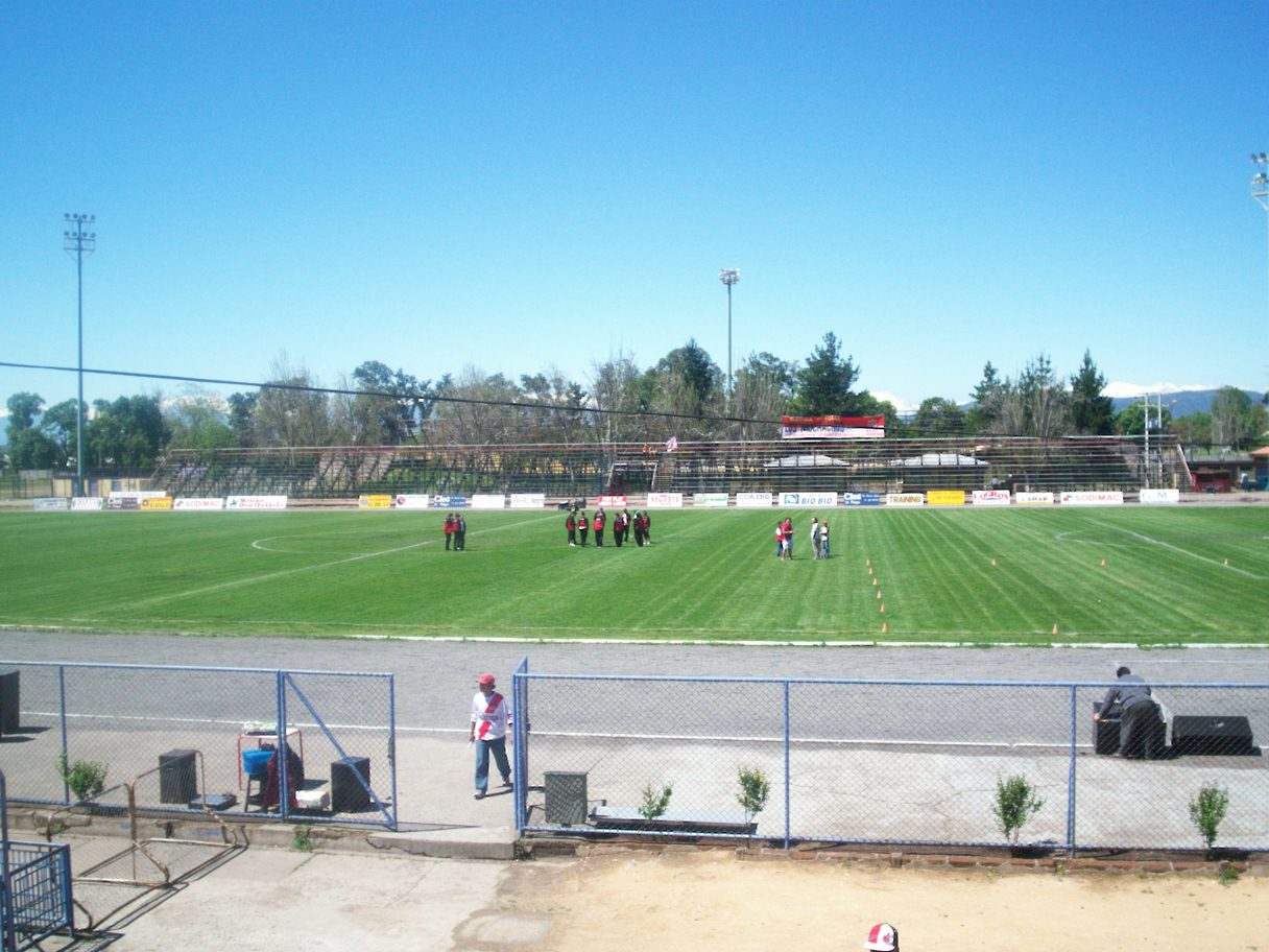 Estadio La Granja horas antes a un partido de Curico Unido.